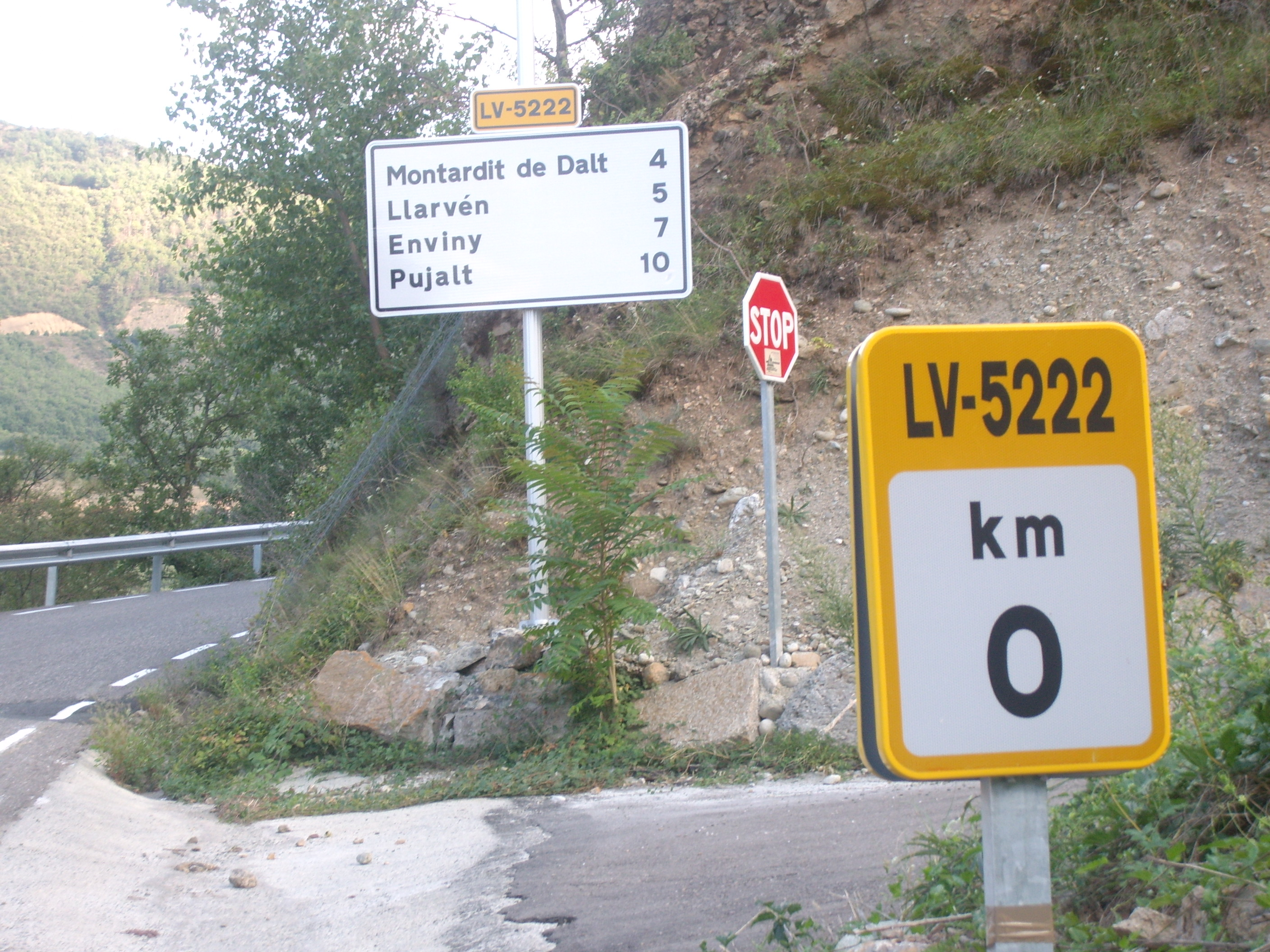 Inici de la carretera LV5222